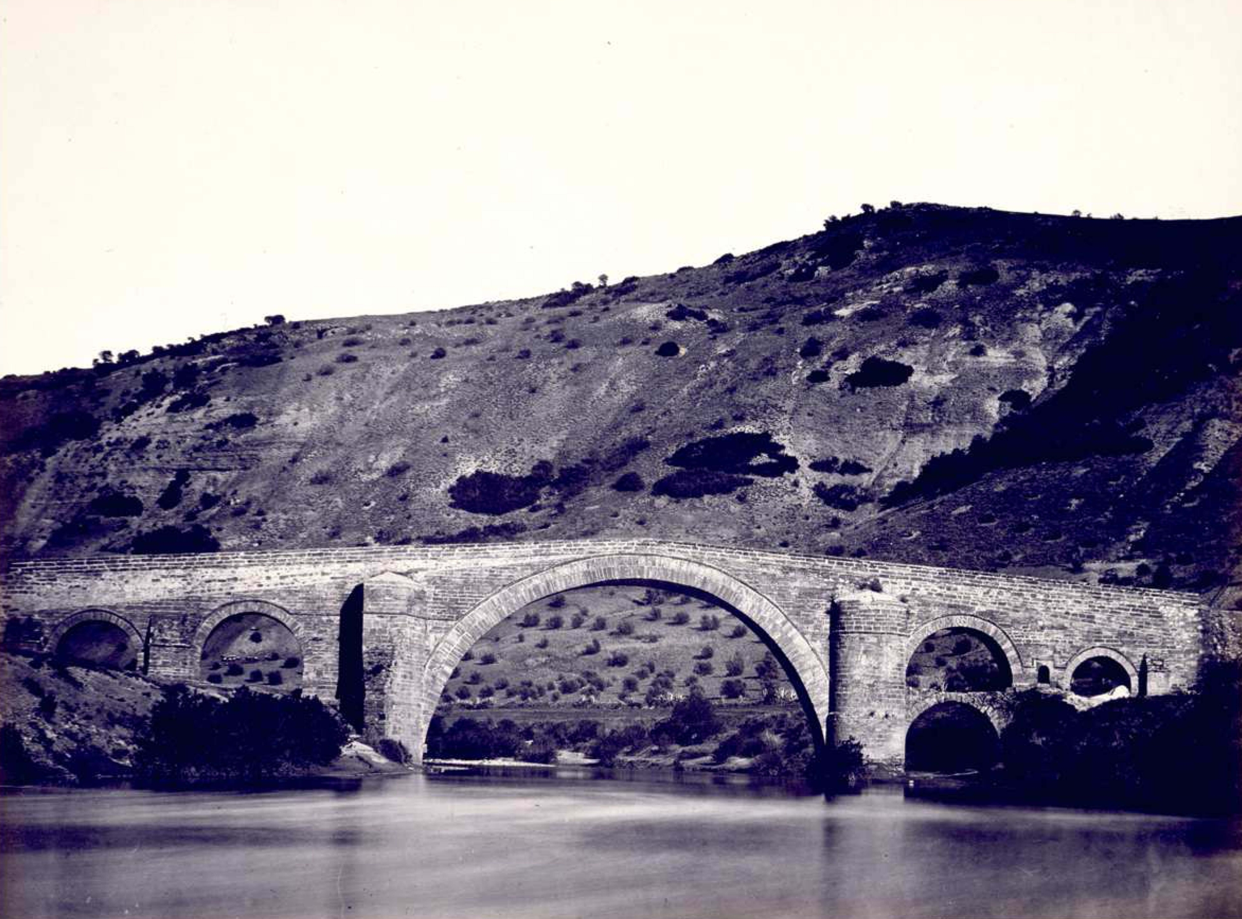 Fotografía del Puente Ariza sobre el río Guadalimar (Úbeda), obra de Andrés de Vandelvira. Imagen extraída y recortada de la fotografía original (página 47 del álbum).